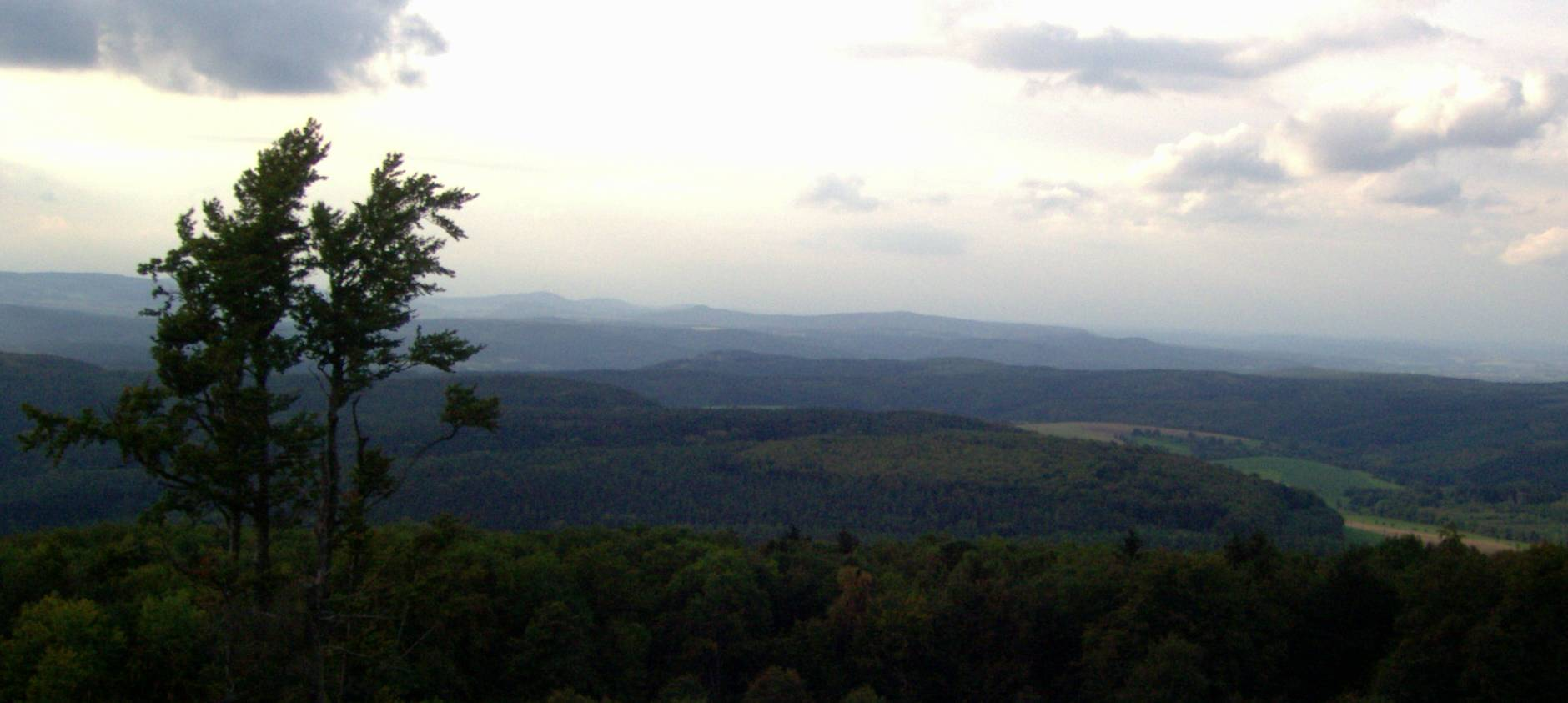 Der Pleß (645 m) im Nordosten der Rhön vom Dolmar (739 m) aus gesehen.